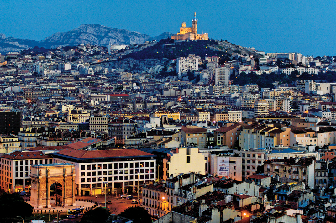 Marseille, lumière tamisée, orientation sud-est.